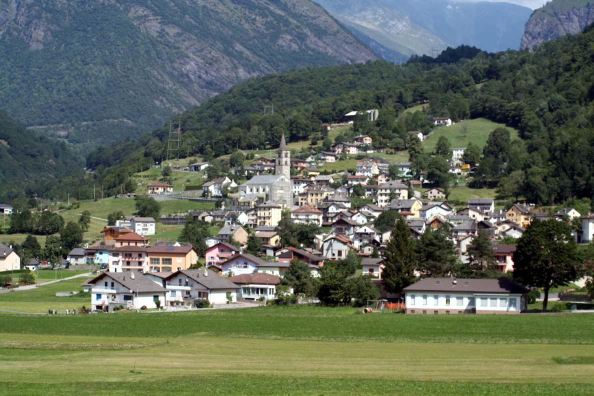 Aquila TI